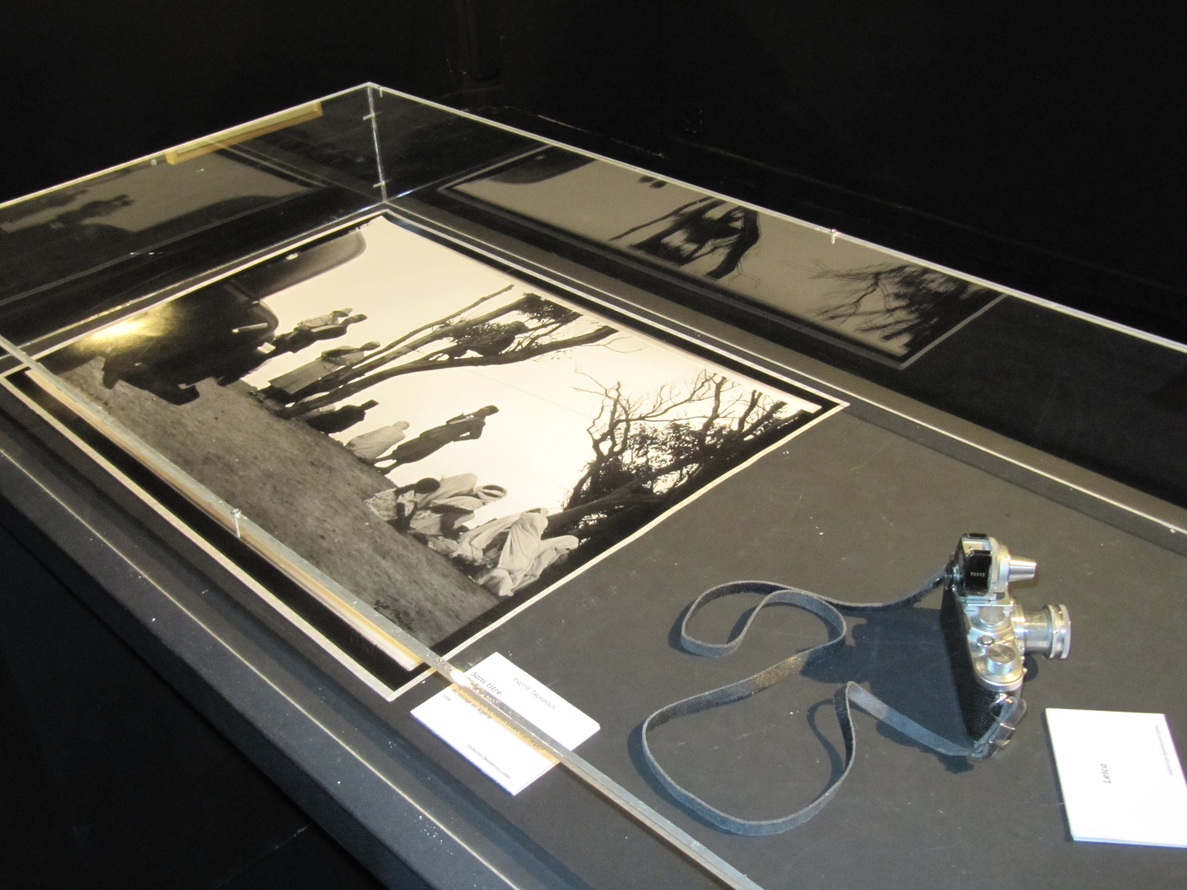 1939 "voyage" en Algérie, retour du corps de son frère Jean (service militaire) – Exposition Yvette Troispoux "Mademoiselle Yvette Troispoux, photographe", première exposition rétrospective présentant des photographies tirées de son album privé à Musée du Montparnasse Novembre 2012. Un livre a été édité. Photographie prise par Lauric Duvigneau